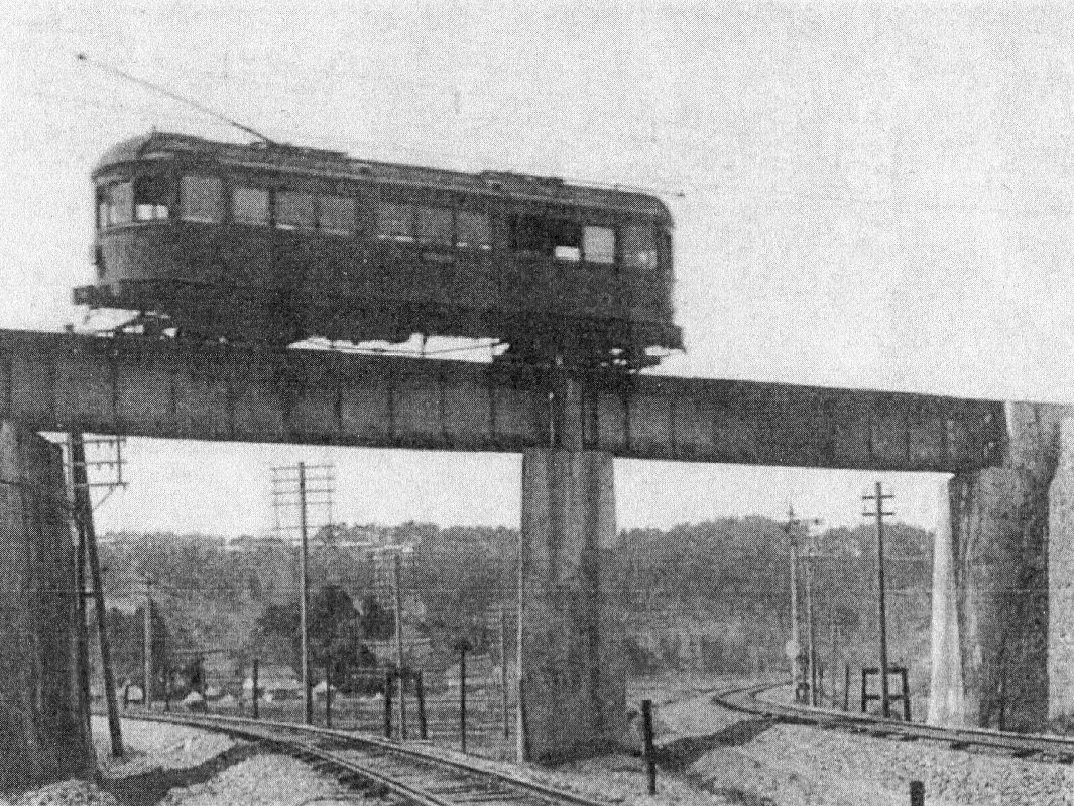 『富山県郷土の山水 呉羽山中心以東編』（村上陽一郎編、1932年（昭和7年）7月、光洋社）所収。当該写真説明文には「富山駅西方の鉄橋を過ぎ近くにあり。右の線は北陸本線、金澤方面行き、左は飛越線、八尾町を経て笹津方面行き将来は飛驒高山に連絡するものなり。上のカード（鉄橋９は越中鉄道、右方面は四方、新湊、伏木へ、左は富山北口へ、正面の山は呉羽山」とある。